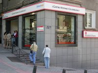 Fachada del Centro Hispano Colombiano (Madrid). Ronda de Segovia 34 esquina con calle de Gil Imón.